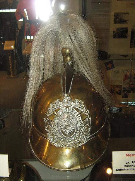 Ehrenhelm des Oberkomandaten der Freiwilligen Turn- und Feuerwehr Nürnberg